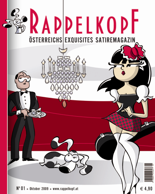 Titelblatt Rappelkopf Ausgabe No. 01